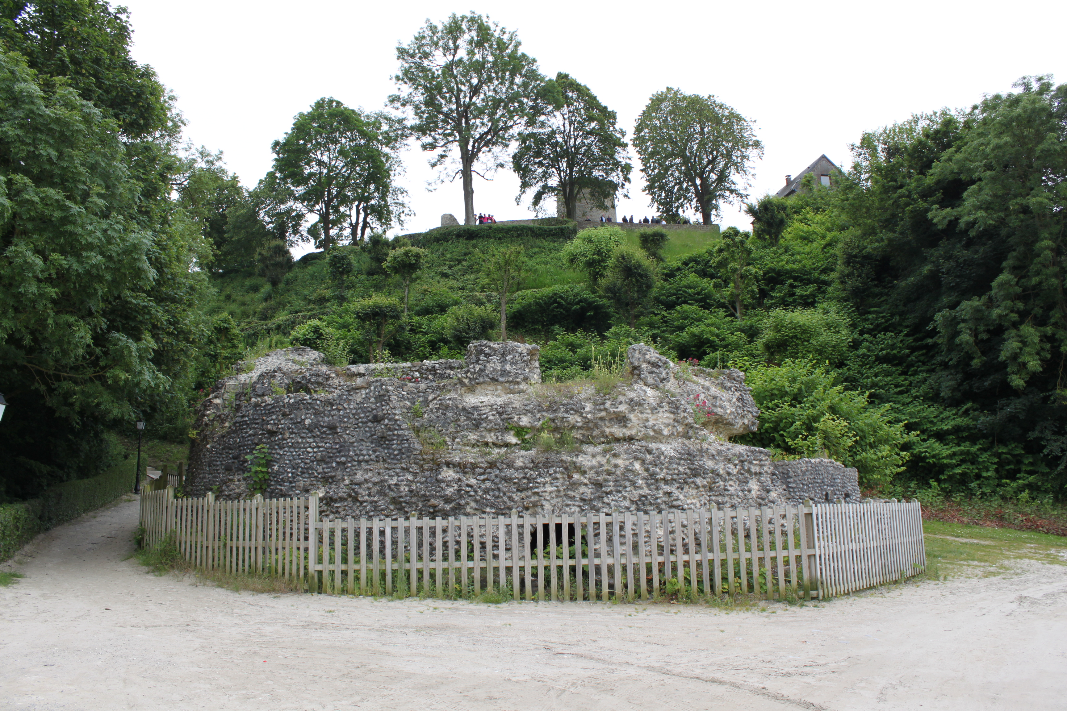 Saint-Valery-sur-Somme, Somme, France